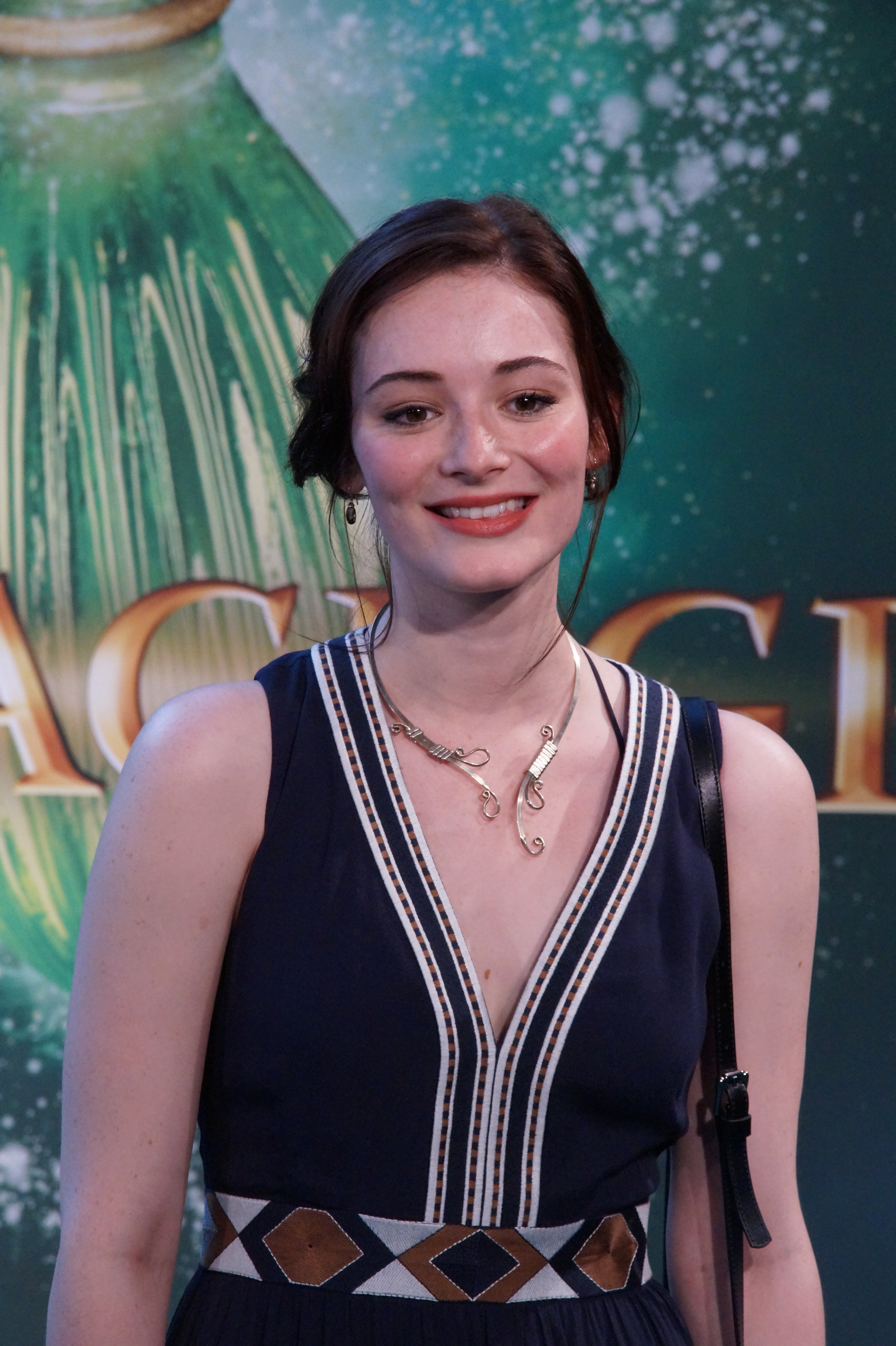 Maria Ehrich bei der Deutschlandpremiere von 'Samaragdgrün', Köln, Juni 2016.